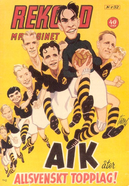 Bengt Kjell i spetsen för AIK. Omslagsbild, Rekordmagasinet nr 32, 1952.